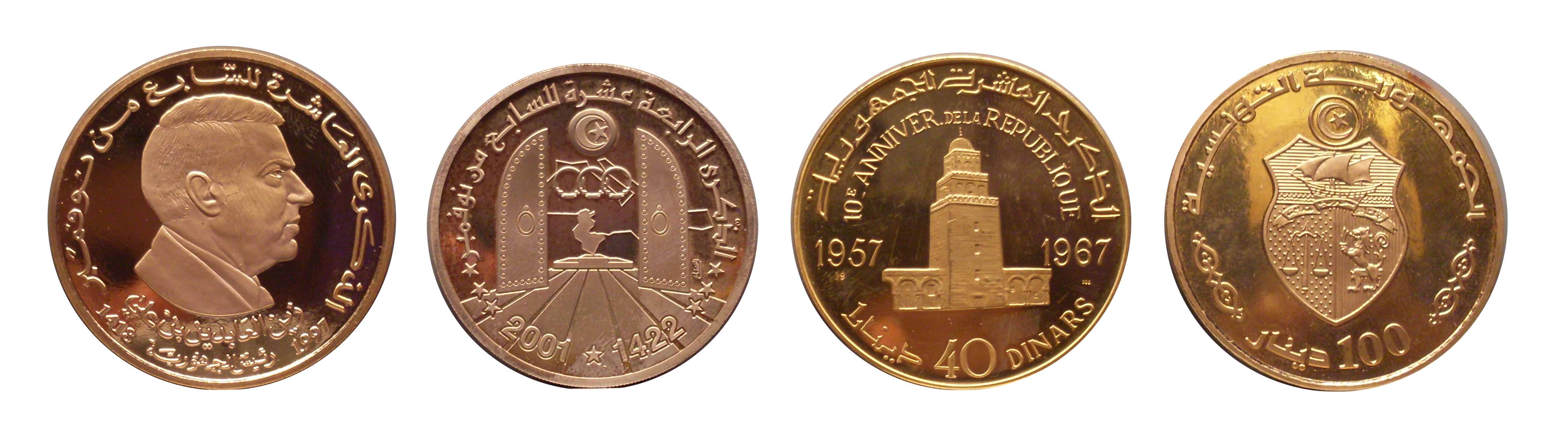 Pièces commémoratives Tunisie